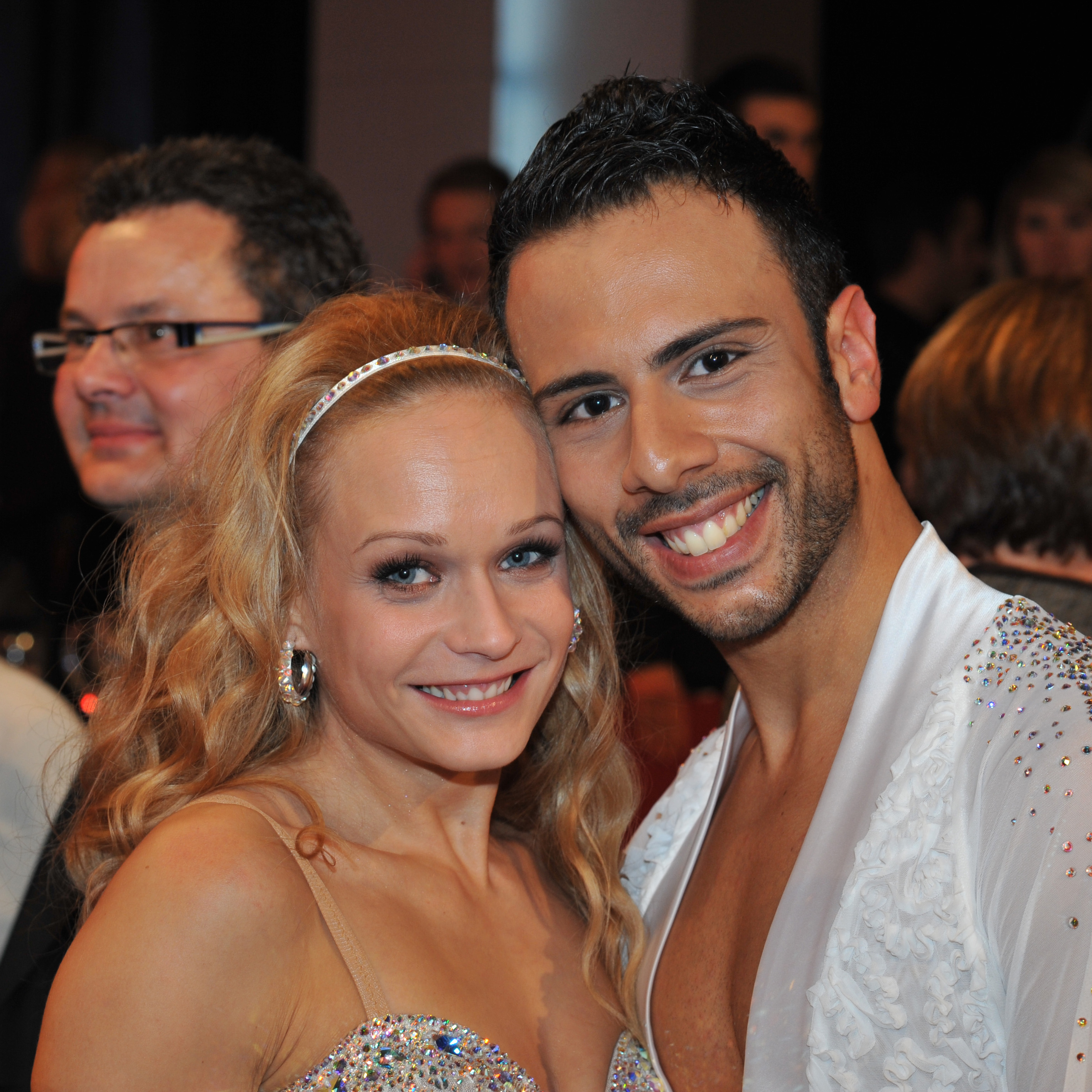 ORF Dancing Stars 2014: Melanie Binder und Danilo Campisi